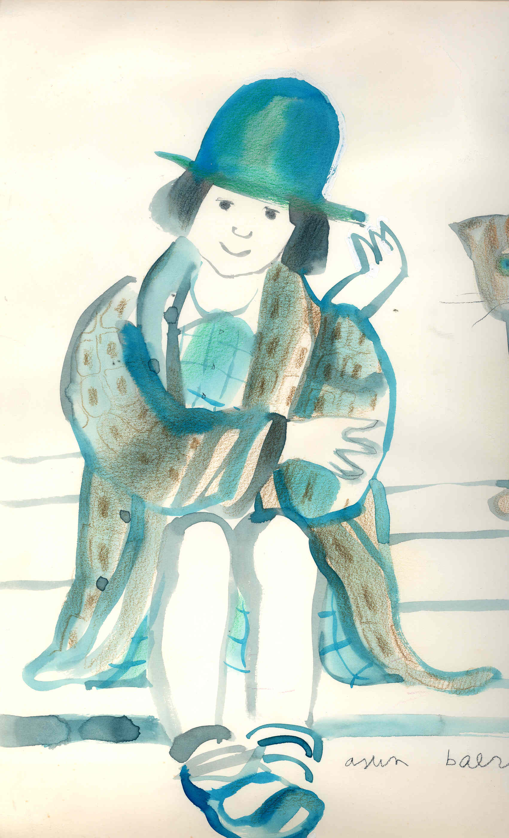 "Munia y la señora piltronera" libururako Asun Balzolak egindako marrazkia. Donostiako Haur Liburuaren Dokumentaziogunean dago jatorrizkoa